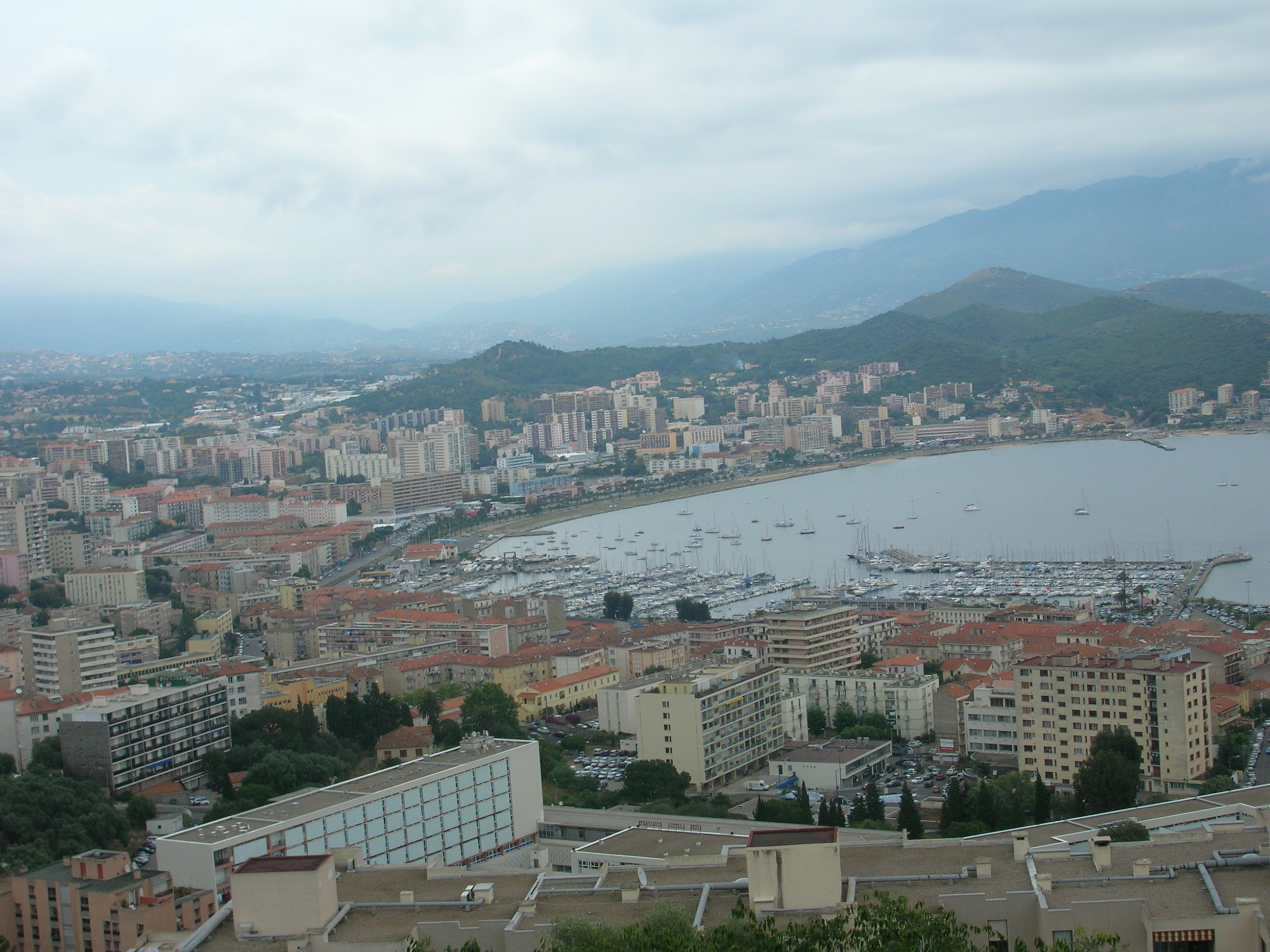 Panoramavue vun der Stad a vum Hafen.